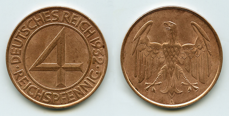 4 Reichspfennig-Münze, Deutsches Reich, Weimarer Republik 1932. Prägeanstalt A (Berlin), Auflage: 27,1 Mio, J. 315. Größe Ø ca. 24 mm Andere Versionen: Armer Heinrich.JPG